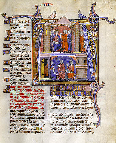 Vidal mayor. (Primera compilación del Fuero de Aragón, realizada por el obispo de Huesca Vidal de Canellas en 1247).